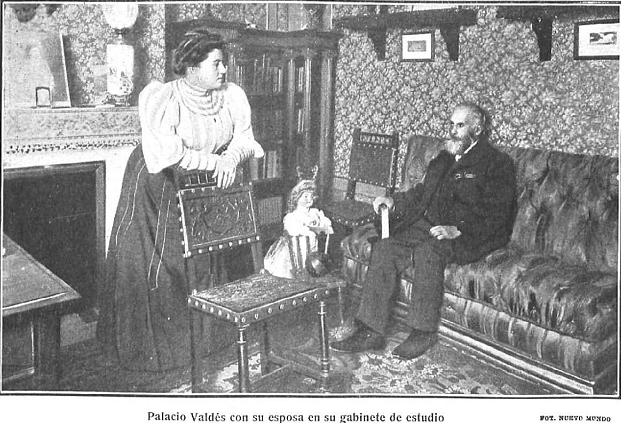 Fotografía de Armando Palacio Valdés acompañado de su esposa, recogida en la revista española Nuevo Mundo.